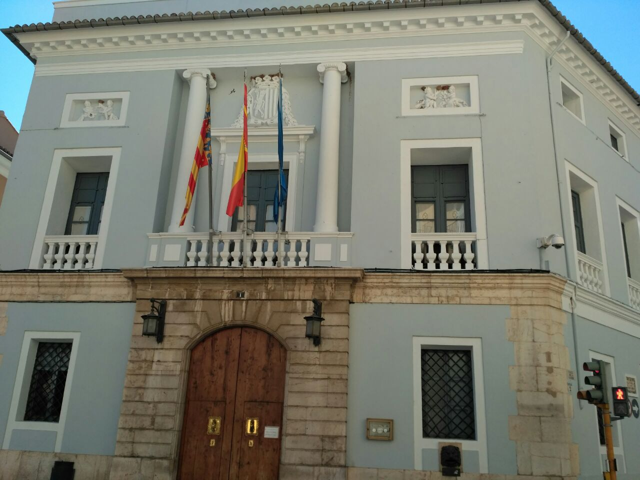 Fachada de uno de los dos edificios que actualmente son sede del Consistorio de carcaixent.